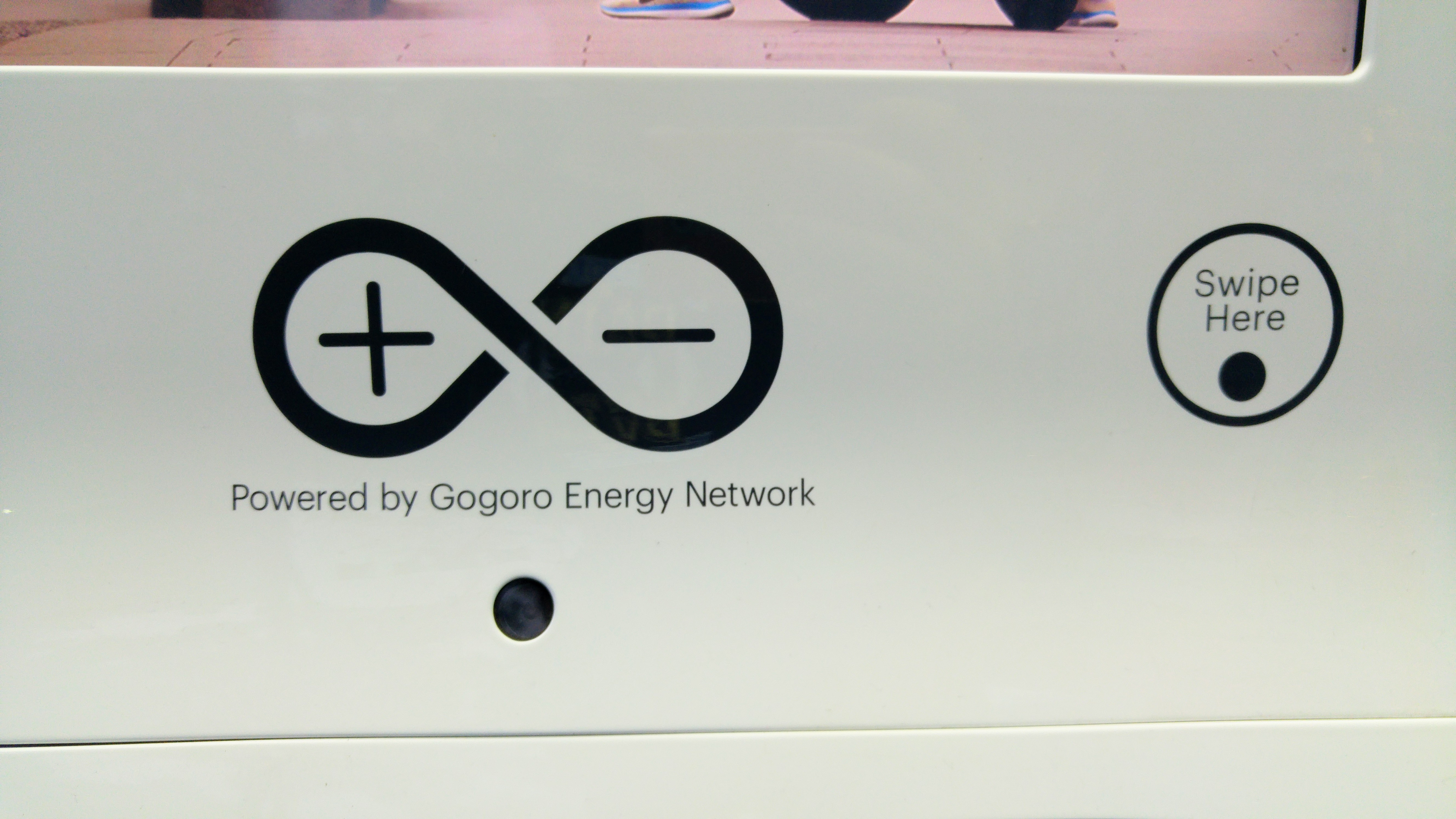 GoStation 本體上的鏡頭與鑰匙感應區（右側 Swipe Here 圓圈）。